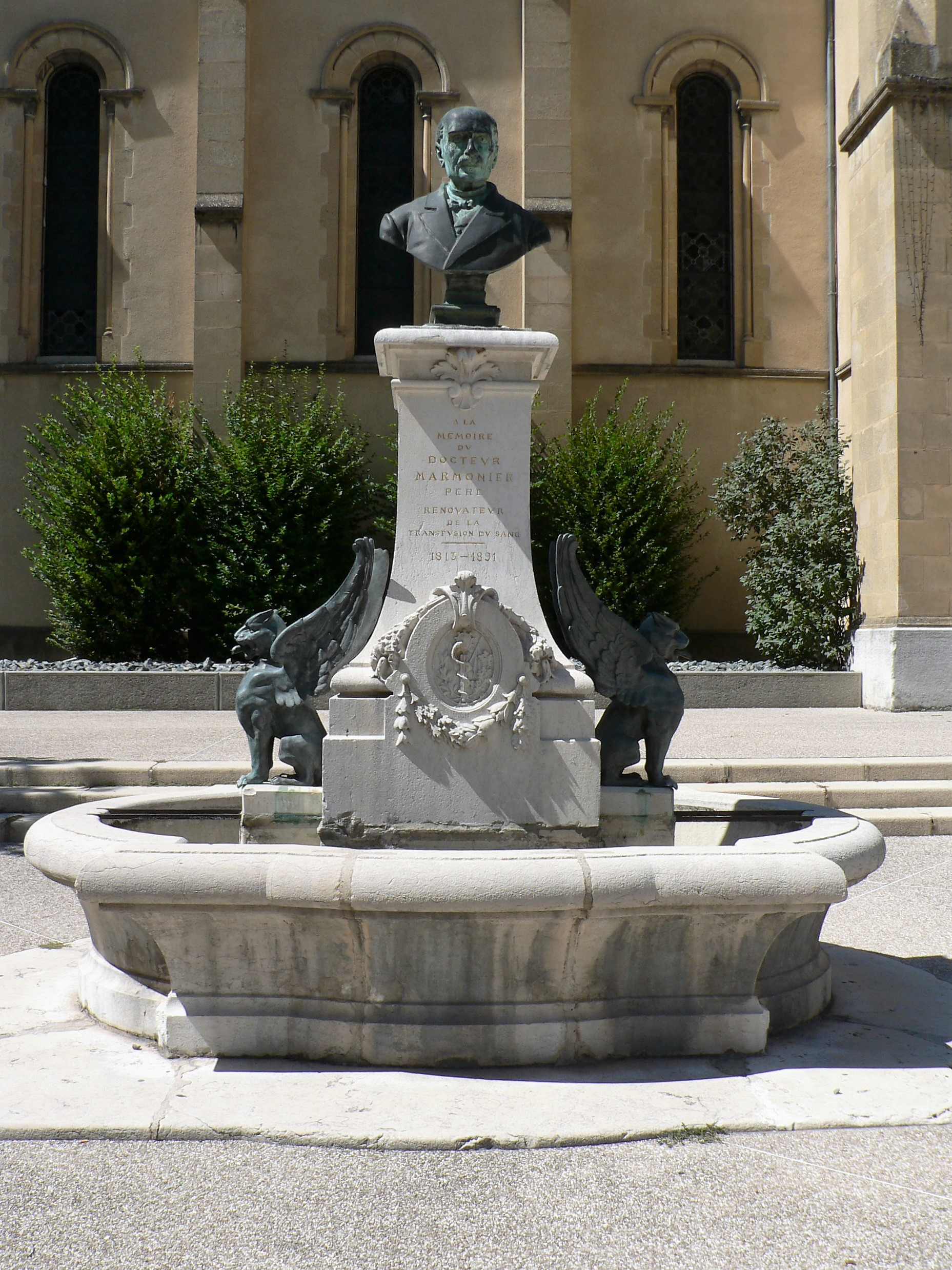 fontaine avec le buste de Melchior Joseph Marmonnier, Domène, Isère, AuRA, France.